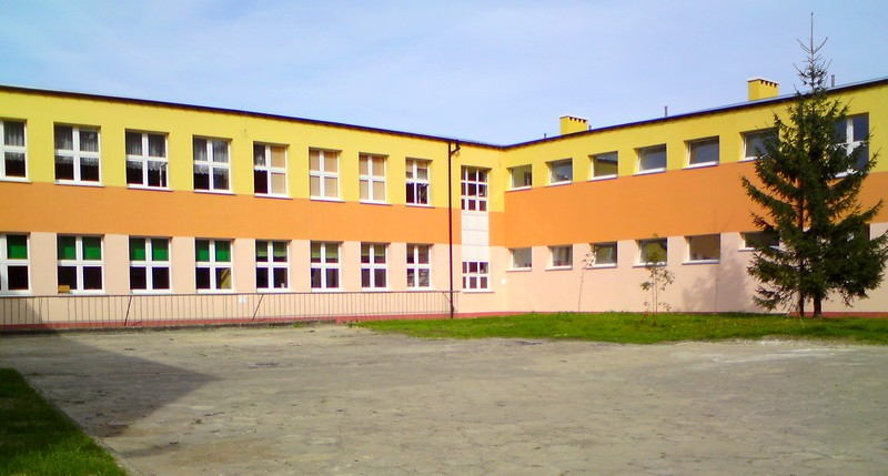 Szkoła Podstawowa nr 3 w Gryficach. Dziedziniec szkolny.